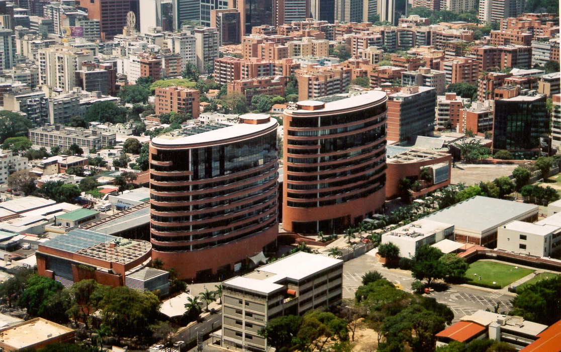 Vista aerea Centro San Ignacio